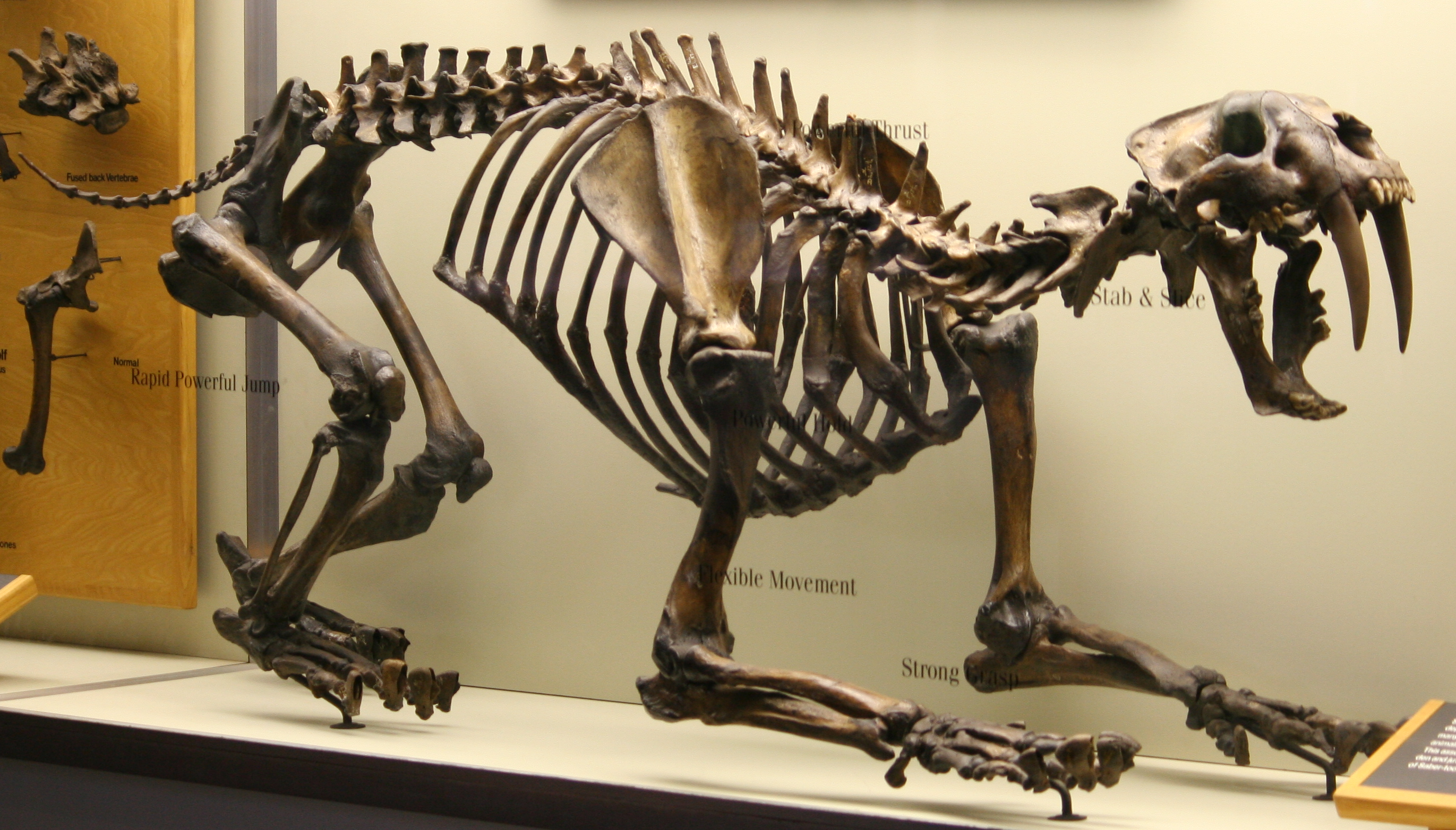 La Brea Tar Pits